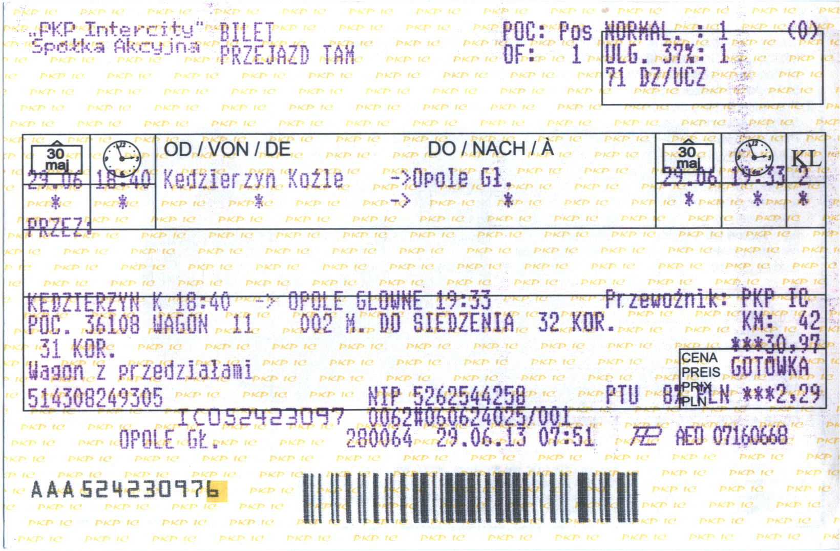 Bilet kolejowy spółki PKP Intercity